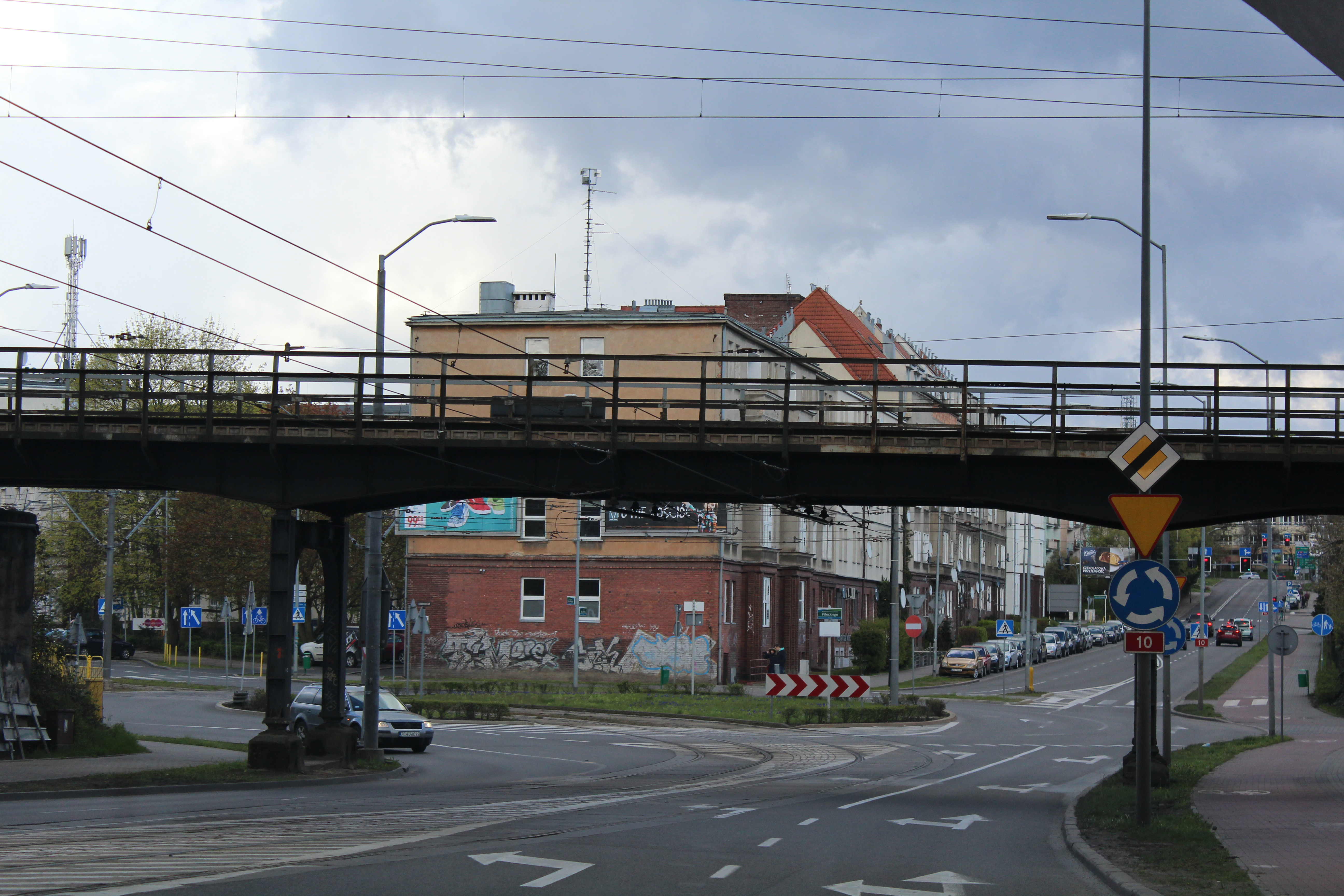 Wiadukt kolejowy nad ul. Ku Słońcu w Szczecinie, 2017 r.